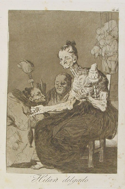 Capricho nº 44: Hilan delgado de Goya, serie Los Caprichos